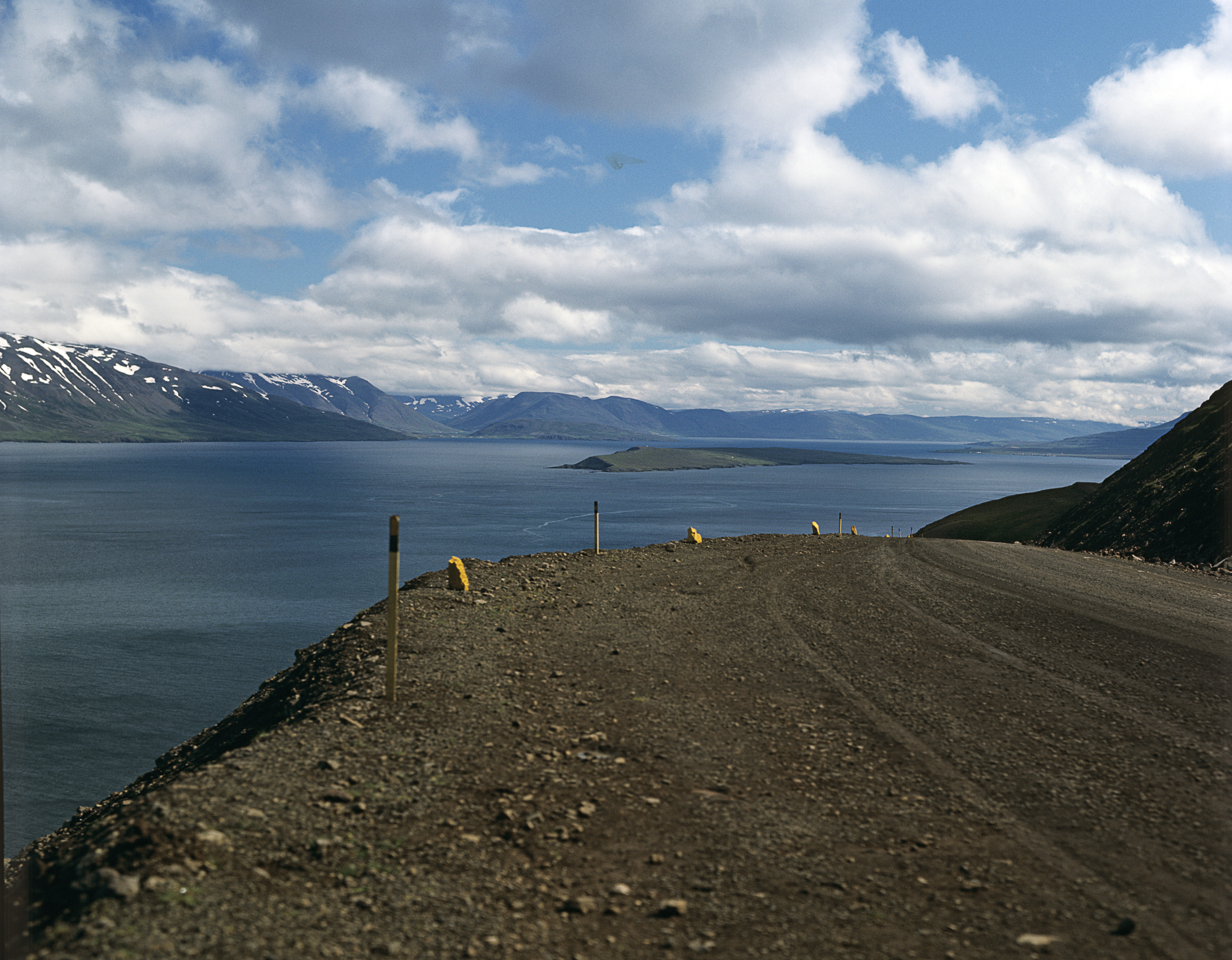 Von Múli bei Ísafjörður nach der Insel Vigur hin.